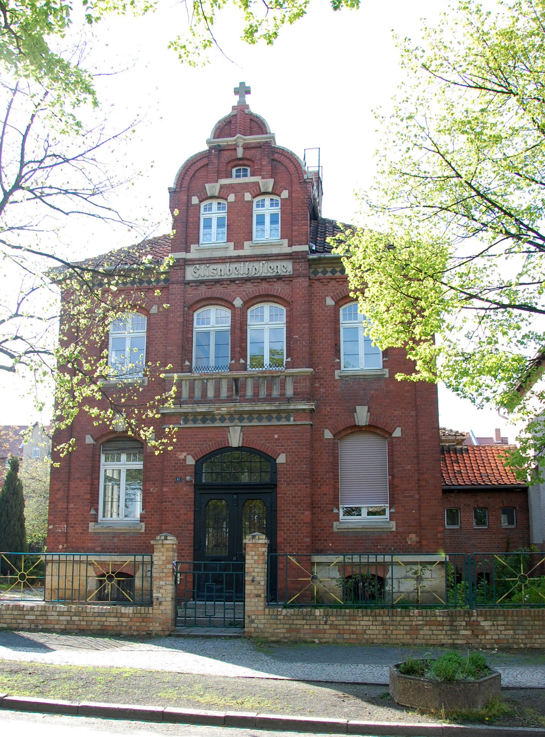 Haus Wallstraße 12 in Quedlinburg